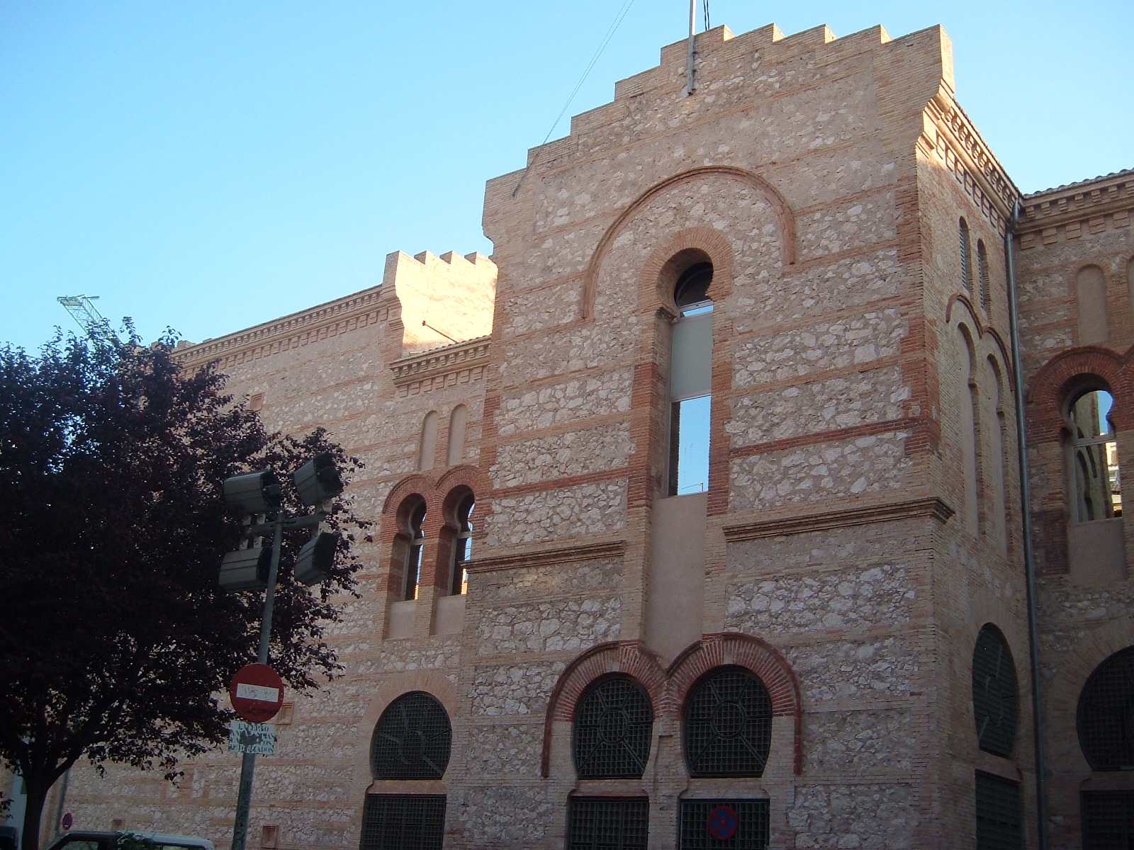 Vista del cuerpo posterior del Teatro Chapí de Villena.